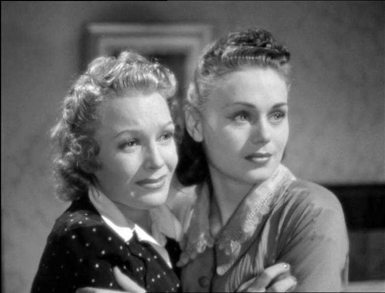 Screenshot del film I grandi magazzini (1939) di Mario Camerini.